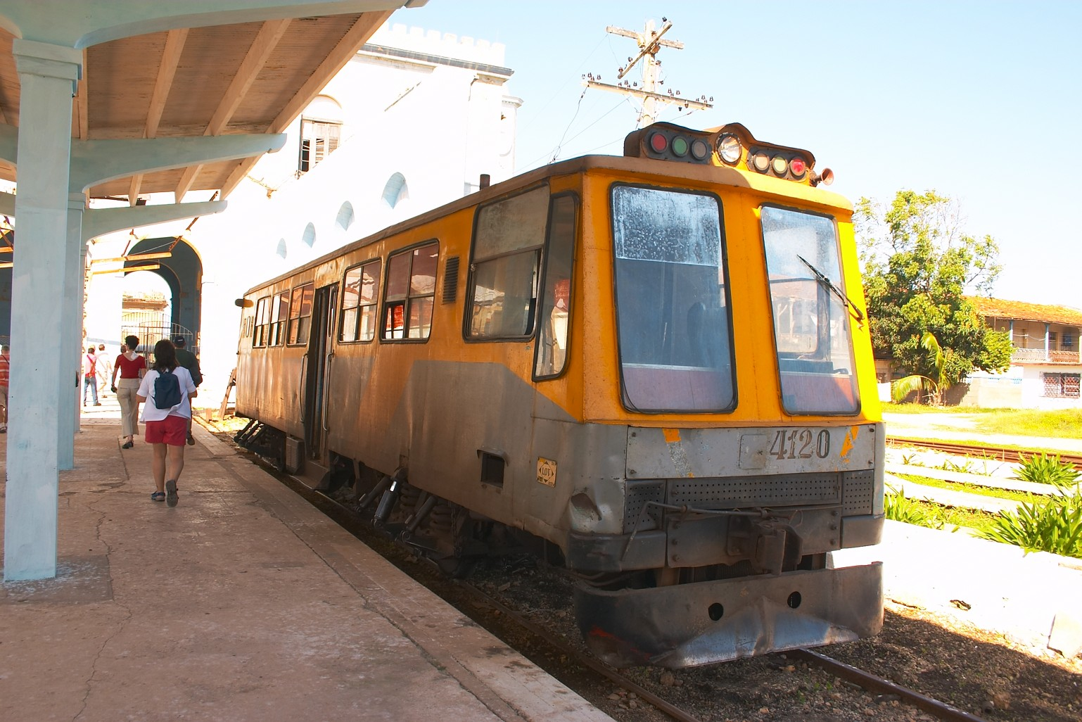 Cardenas city, Cuba